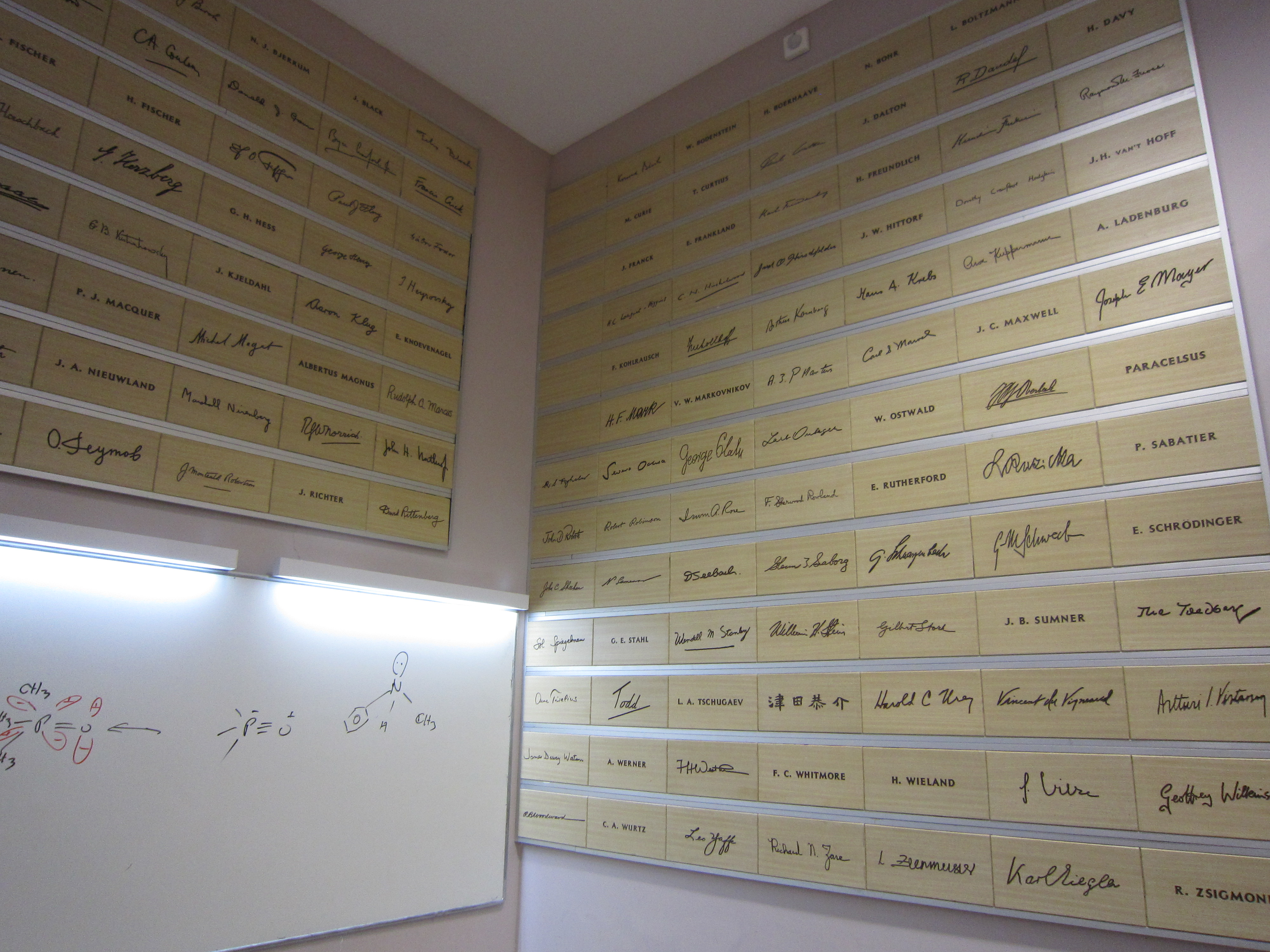 הפקולטה לכימיה בטכניון